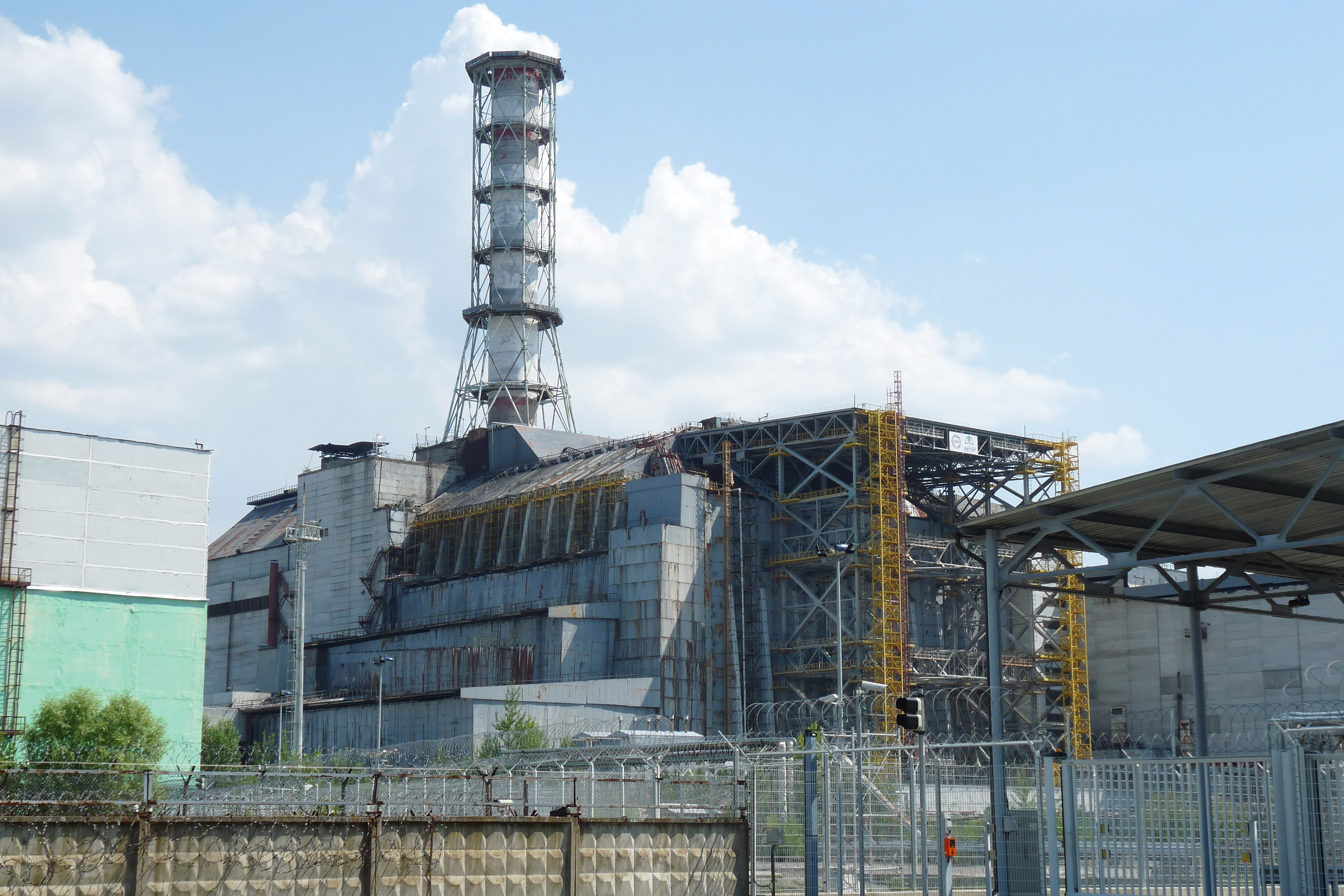 Chernobyl